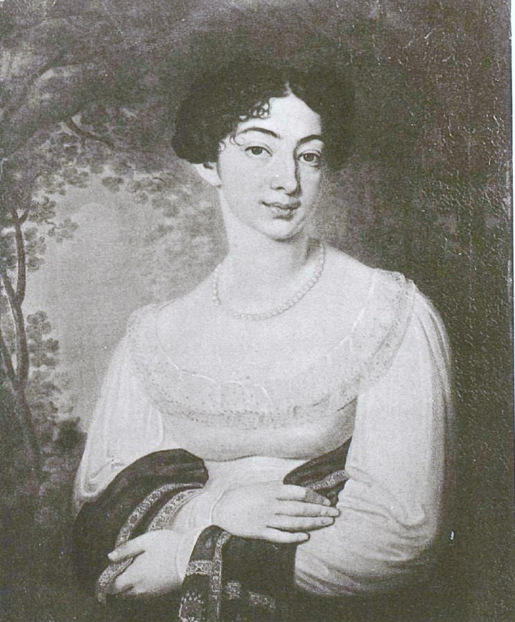 Графиня Елена Ивановна Сиверс (1789-1866), дочь Ивана Петровича и Марии Дмитриевны Дуниных; с 1802 года была замужем за Карлом Карловичем Сиверс (1772-1856).